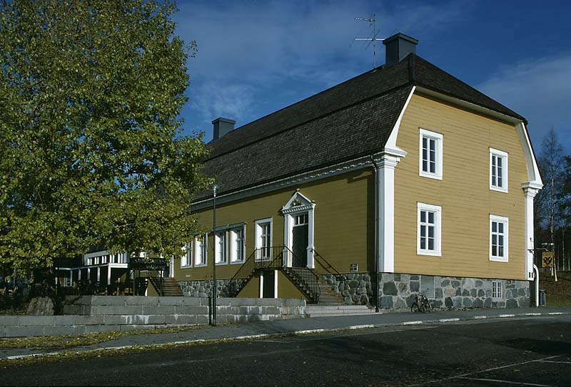 Bruksherrgård; Byggnadsverk; Miljöer; Slott och herrgårdar; Stadsmiljö